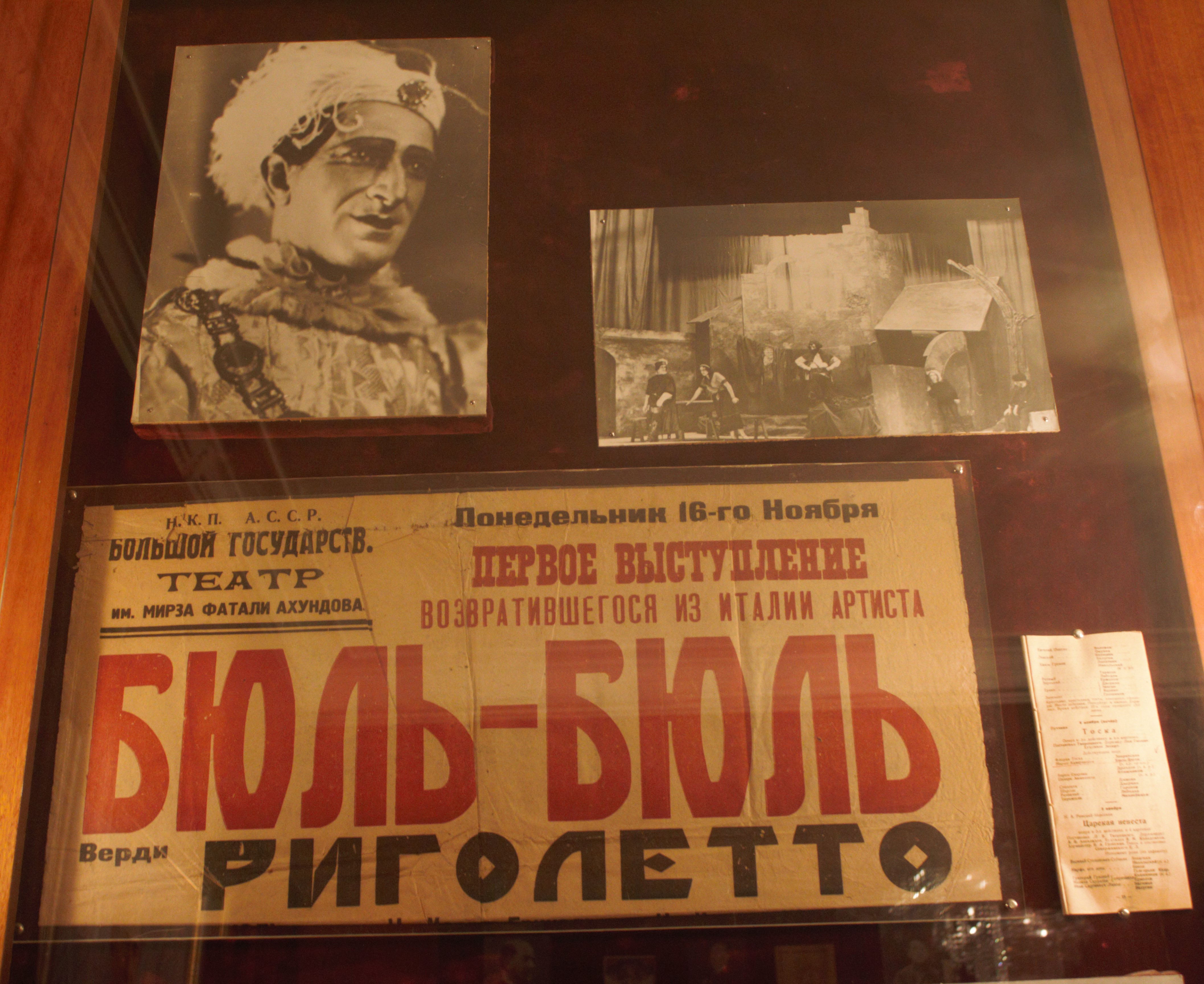 Экспонаты мемориального музея Бюльбюля. Бюльбюль в роли Герцога в опере "Риголетто". Афиша оперы "Риголетто".